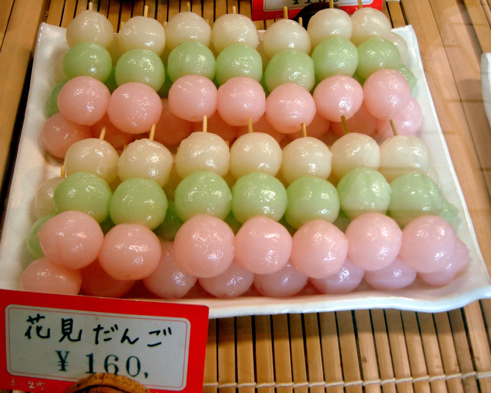 花見団子（京都市上京区出町通今出川上ル青龍町236、出町柳駅最寄りの豆餅・和菓子店「出町ふたば」）